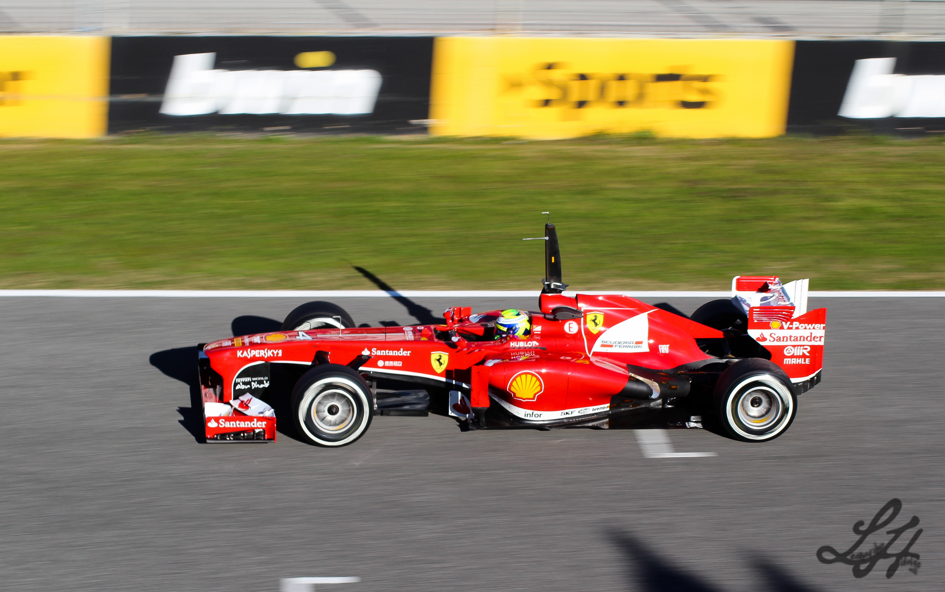 Fotos hechas el 7 de Febrero de 2013 en el circuito de Jerez, plena pre-temporada de F1. Would you like to follow me on Instagram and Twitter?